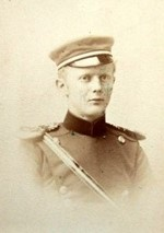 Porträtfotografie des nachmaligen Chemikers Erich Müller